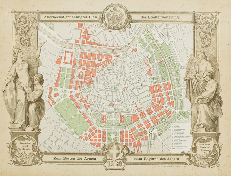 Allerhöchst genehmigter Plan der Stadterweiterung. kolorierter Holzstich.